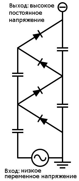 Простой умножитель из двух секций.